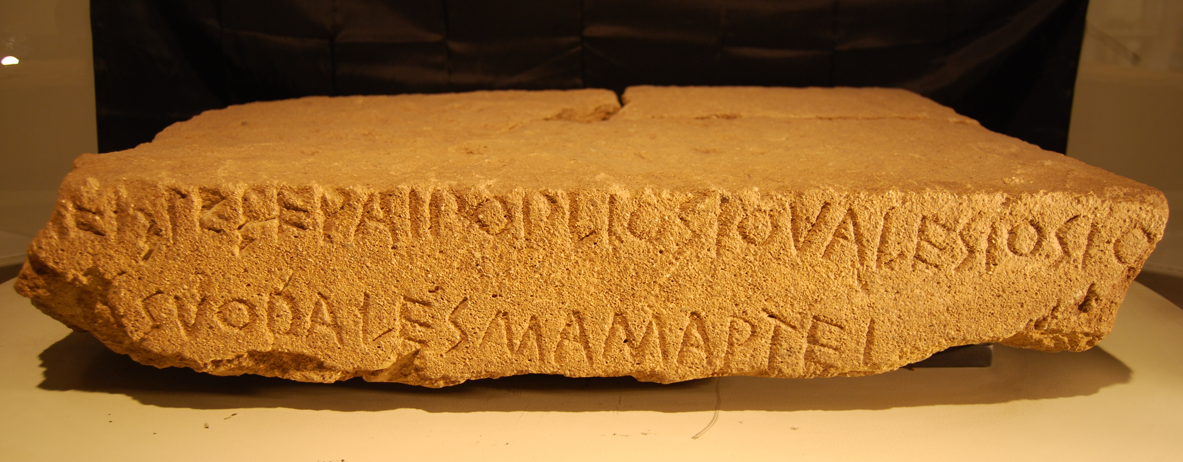 EDR 078476